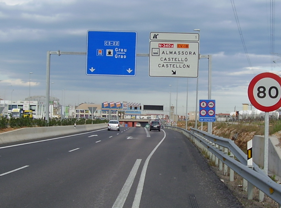 Imagen del comienzo de la autovía CS-22 en Castellón